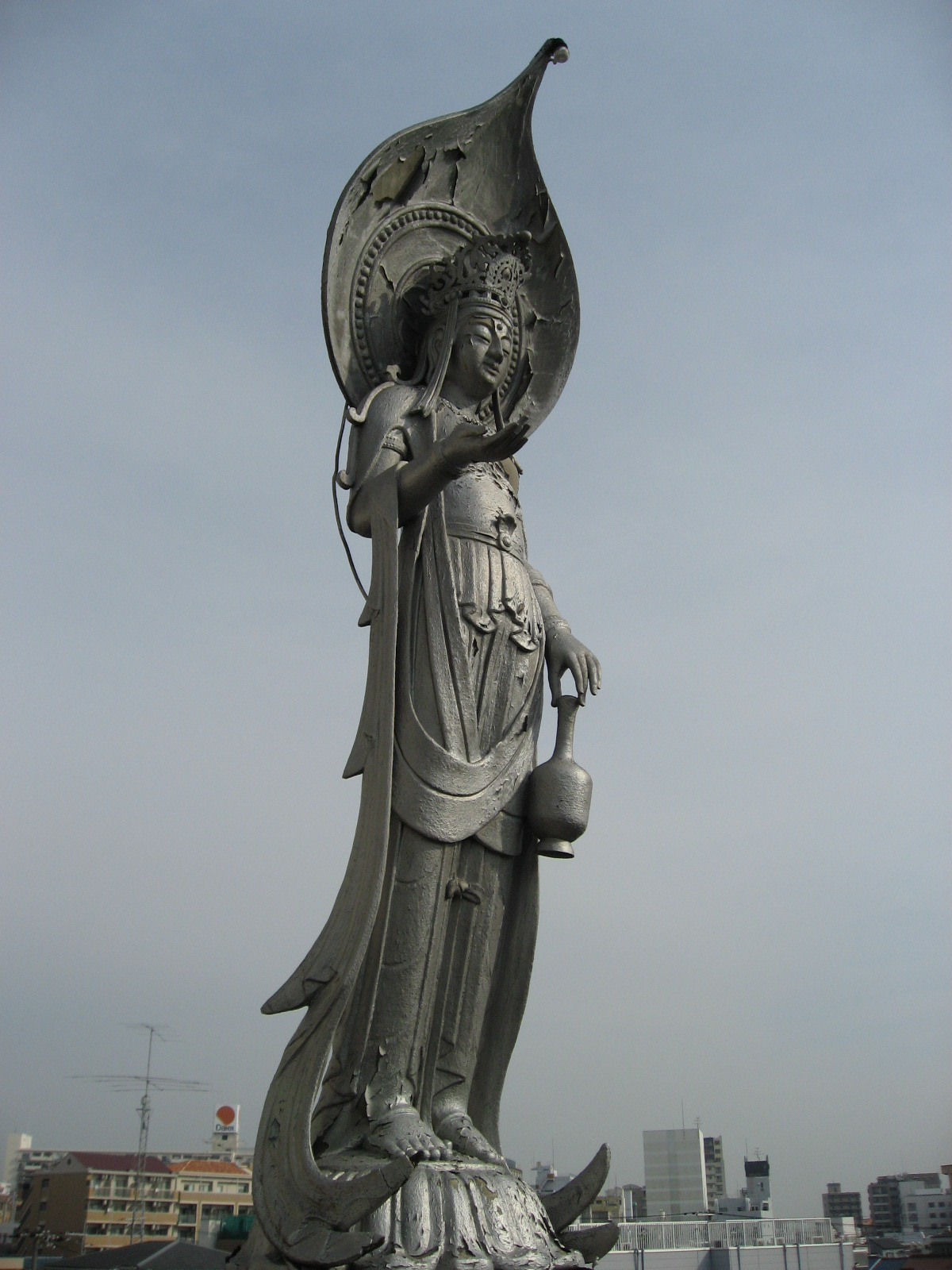 一願をかけお祈りすると、願いが叶えられる仏さまとして信仰されている。